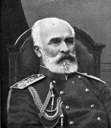 Бистром, Родриг Григорьевич, генерал-адъютант, генерал от инфантерии